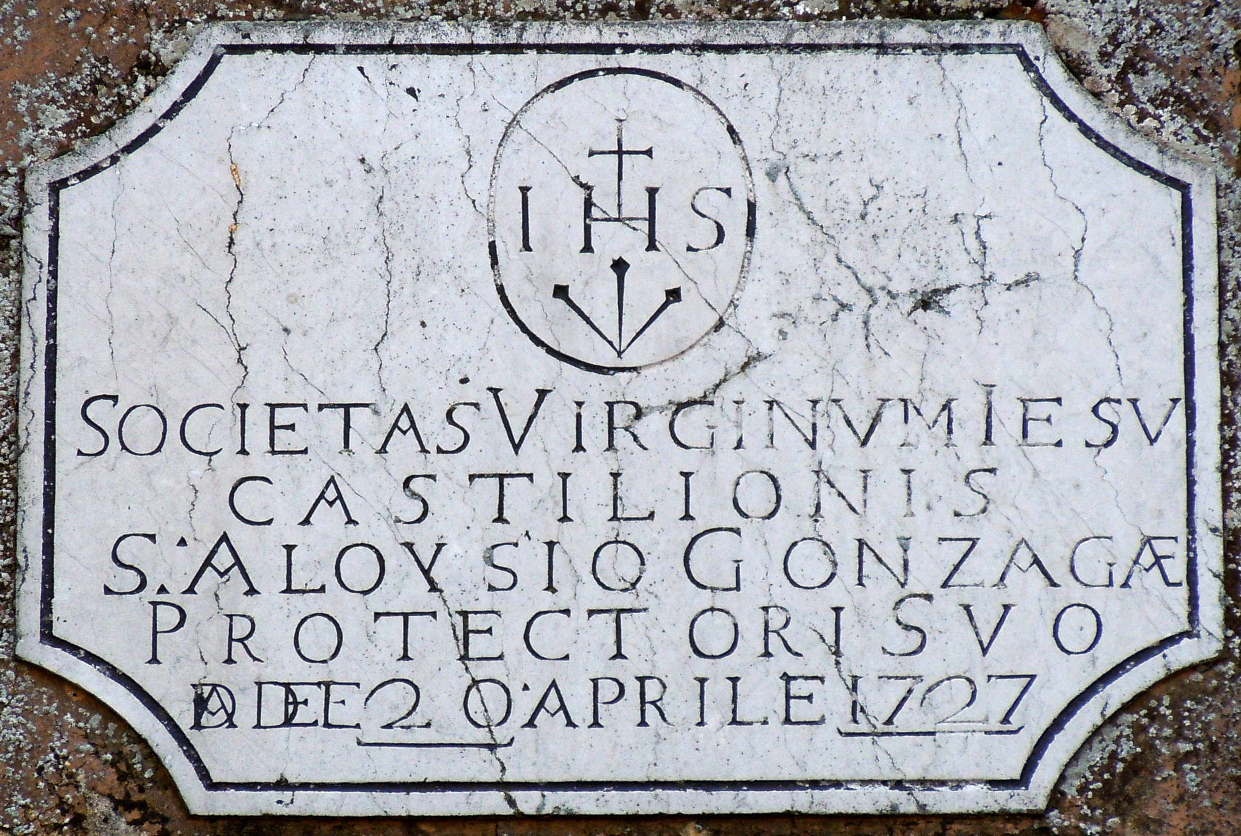 Casaloldo-Corte Molinello, lapide sulla chiesa.